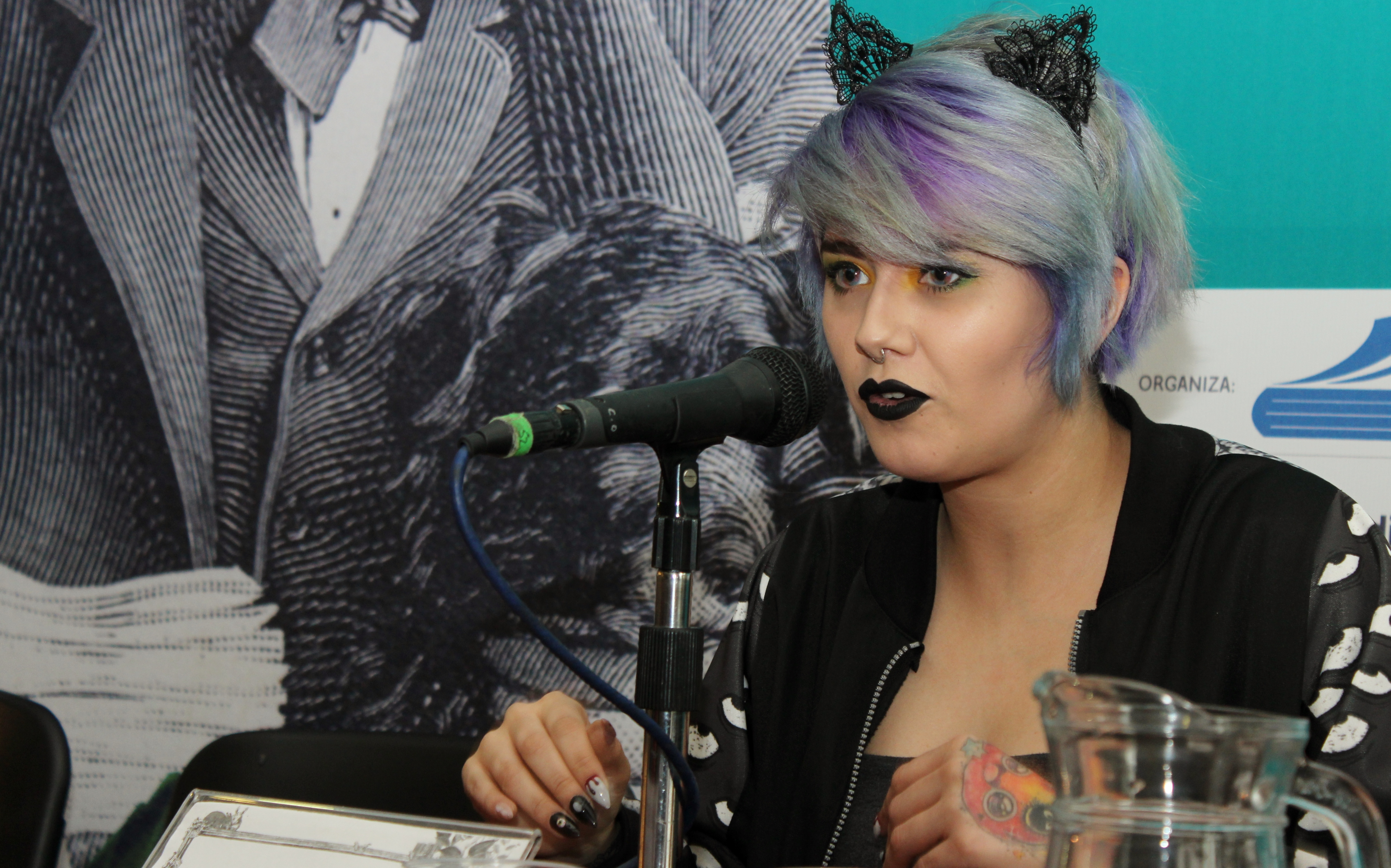 La animadora y youtuber chilena Tabatha Pacer durante la presentación de El libro secreto del universo -su debut literario que ella misma ha ilustrado- en la Feria Internacional del Libro de Santiago 2018 (sala Camilo Mori).